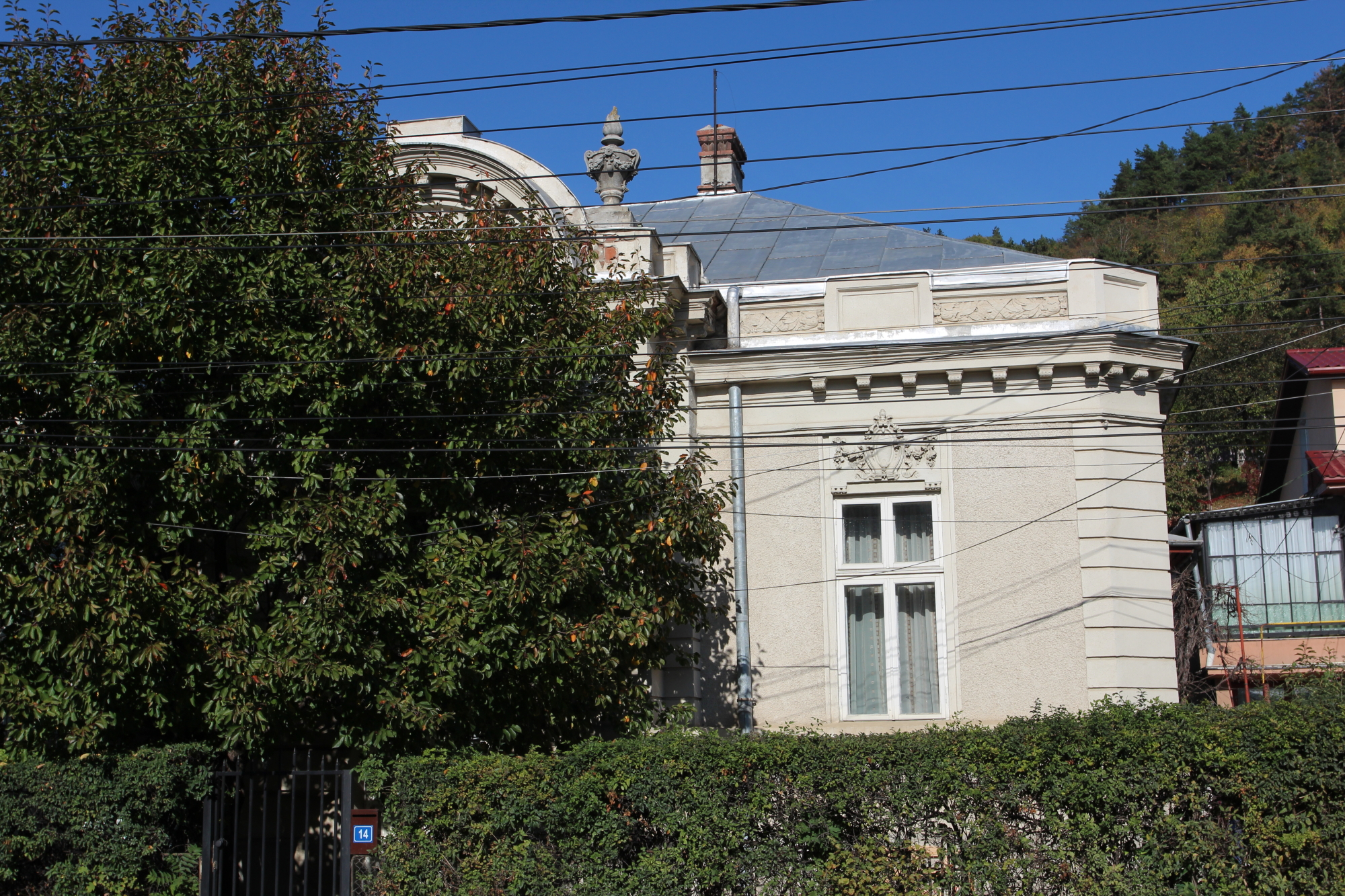 Casa cu amfore